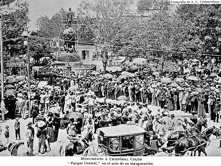 Inauguración del monumento a Cristóbal Colón en el Parque Central de Guatemala en 1896.